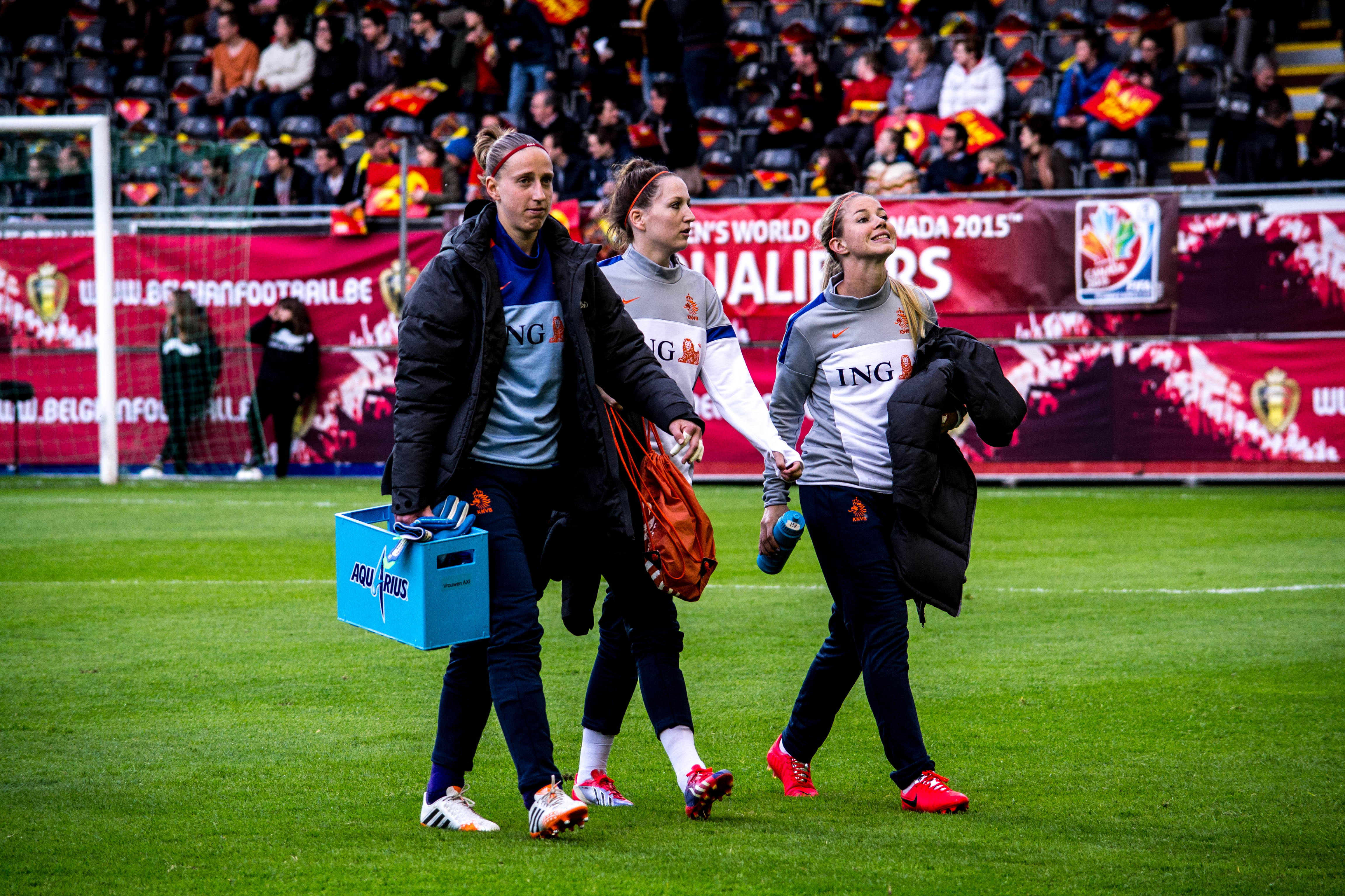 Sari Van Veenendaal, Dominique Janssen (?) and Anouk Hoogendijk